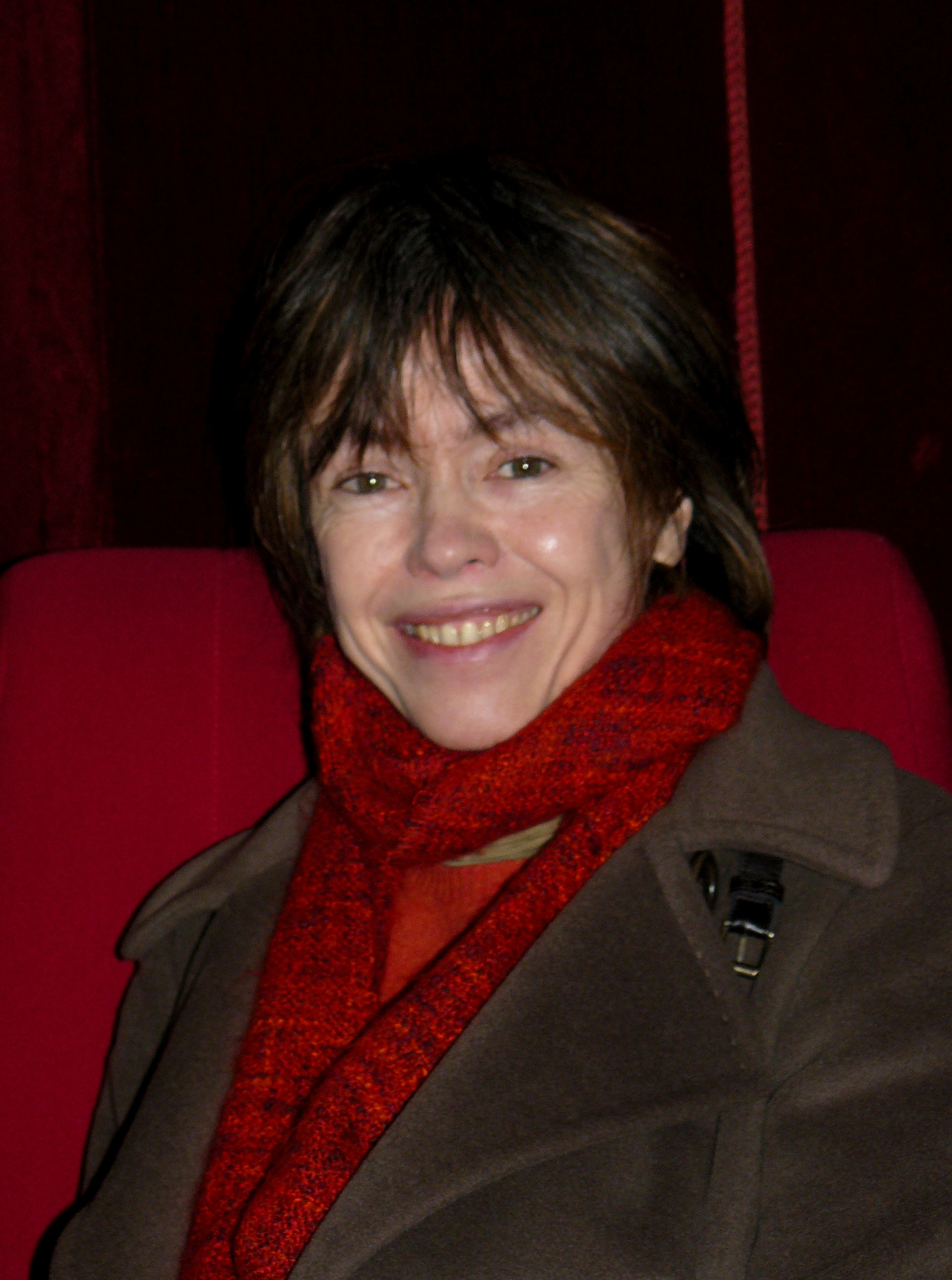 La réalisatrice Camille de Casabianca lors d'une rencontre pour son film "C'est Parti", le 28 février 2010 à Paris.